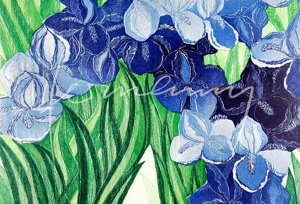 Farbholzschnitt, Gerhard Hermanns, Iris